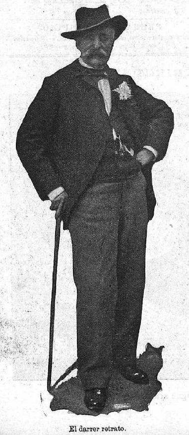 El darrer retrato de Manuel Moliné